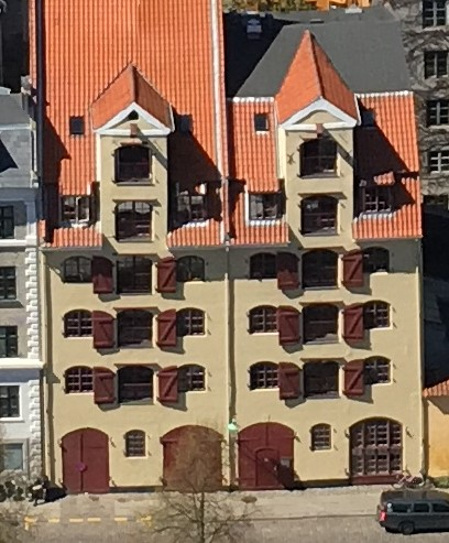 Overgaden Neden Vandet 45 in Copenhagen, Denmark